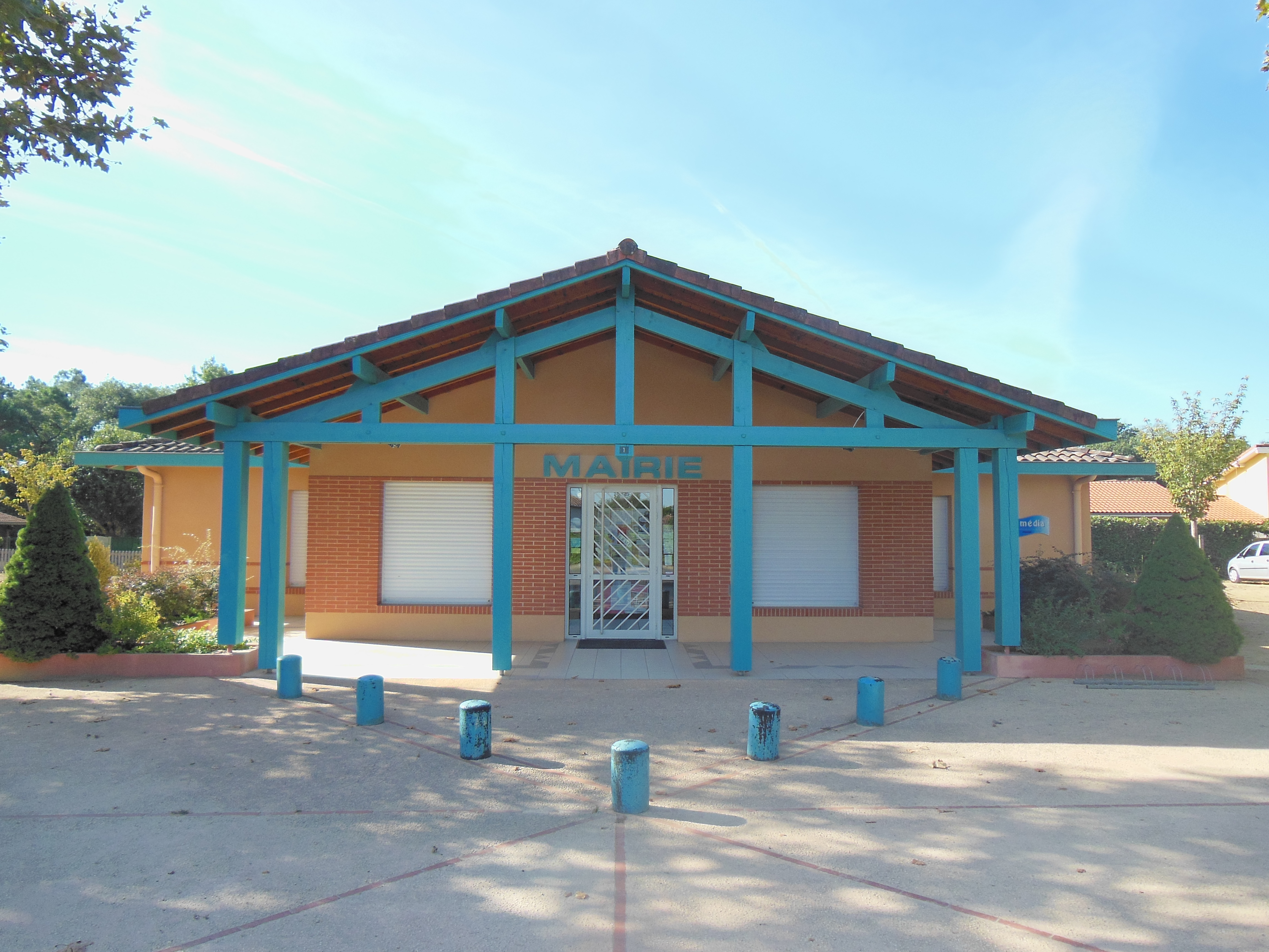 Mairie de Garosse, dans le département français des Landes